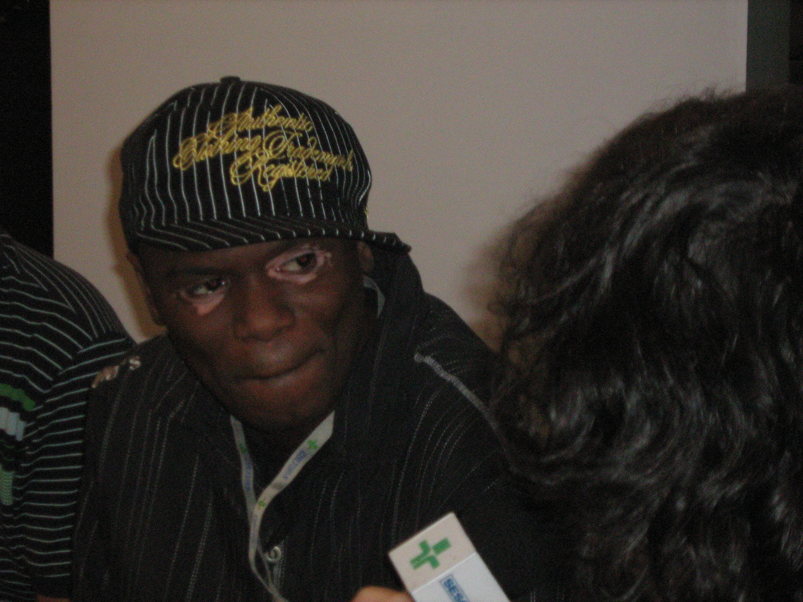 Rappin' Hood, cantor brasileiro